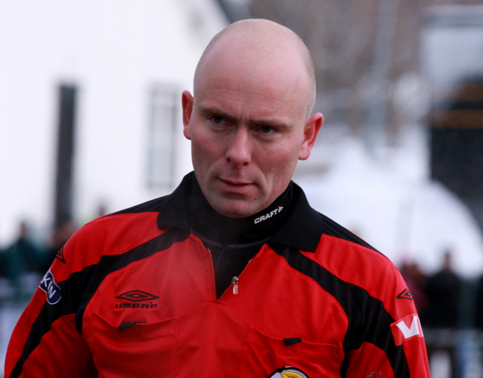 Dag Vidar Hafsås, RBK - AIK